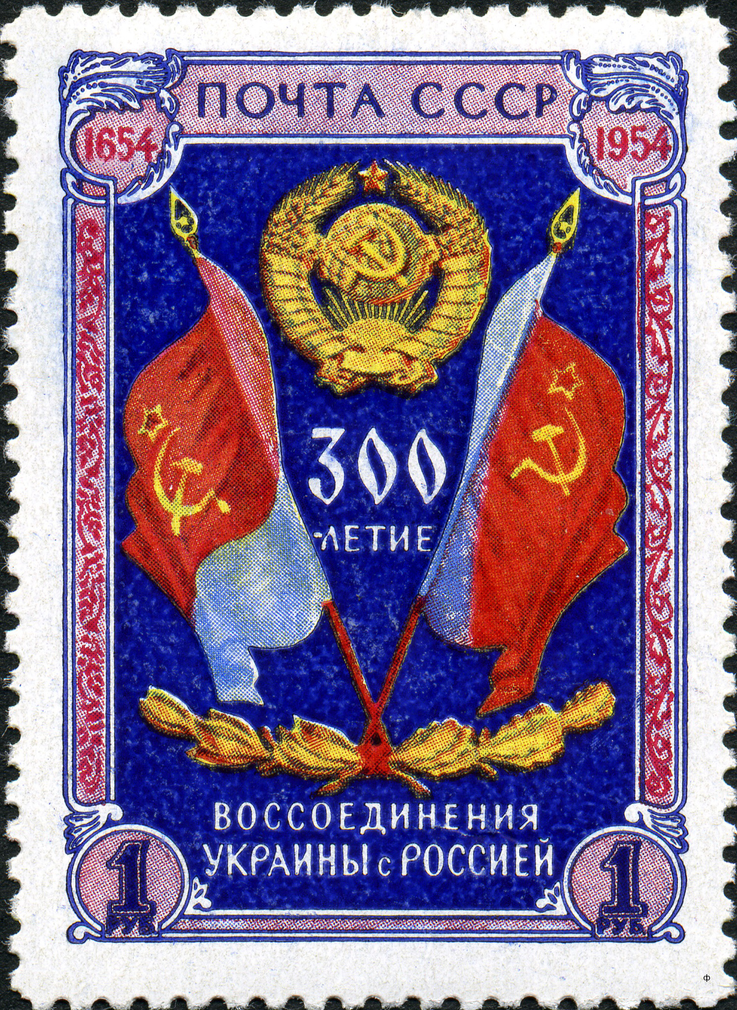 Марка СССР